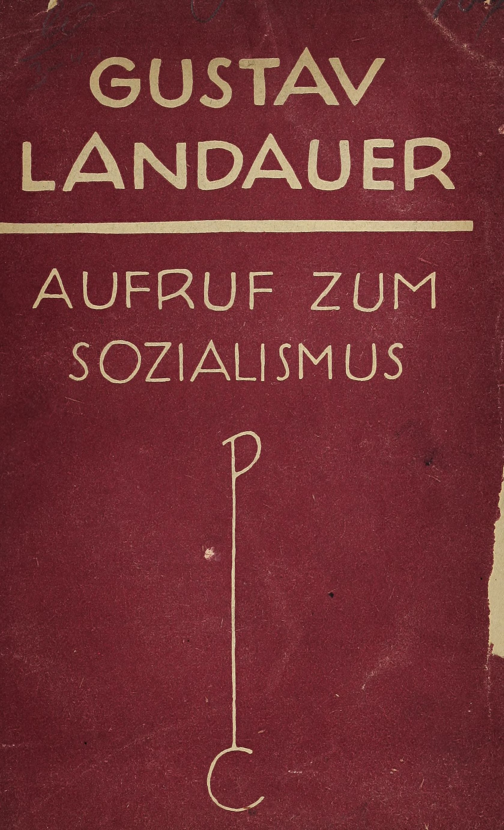 Cover der zweiten Auflage (Berlin: Cassirer, 1919) von Gustav Landauers Aufruf zum Sozialismus.